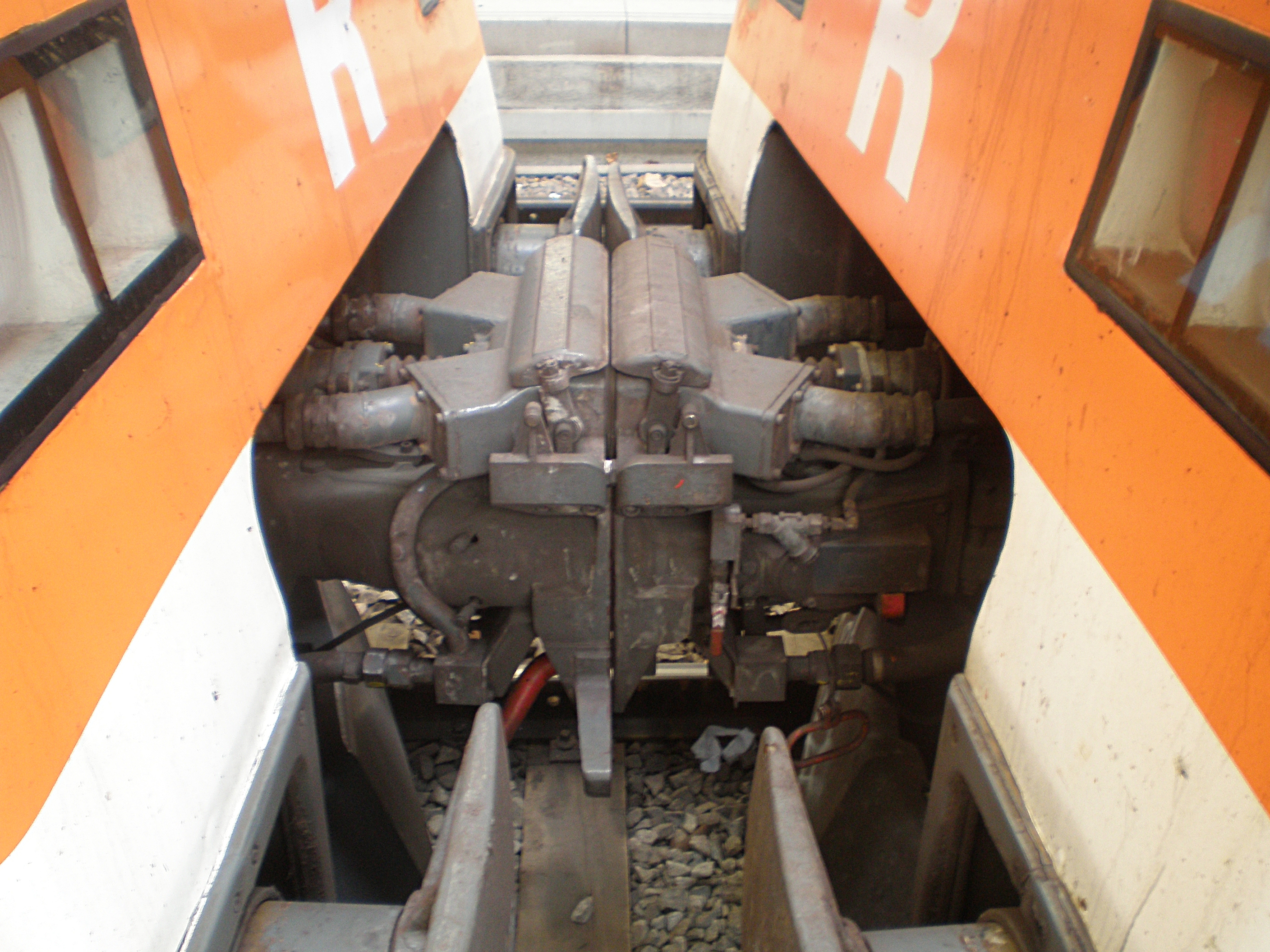 Acople Scharfenberg entre dos unidades eléctricas de la serie 451 de Renfe Operadora en la Estació de França de Barcelona.